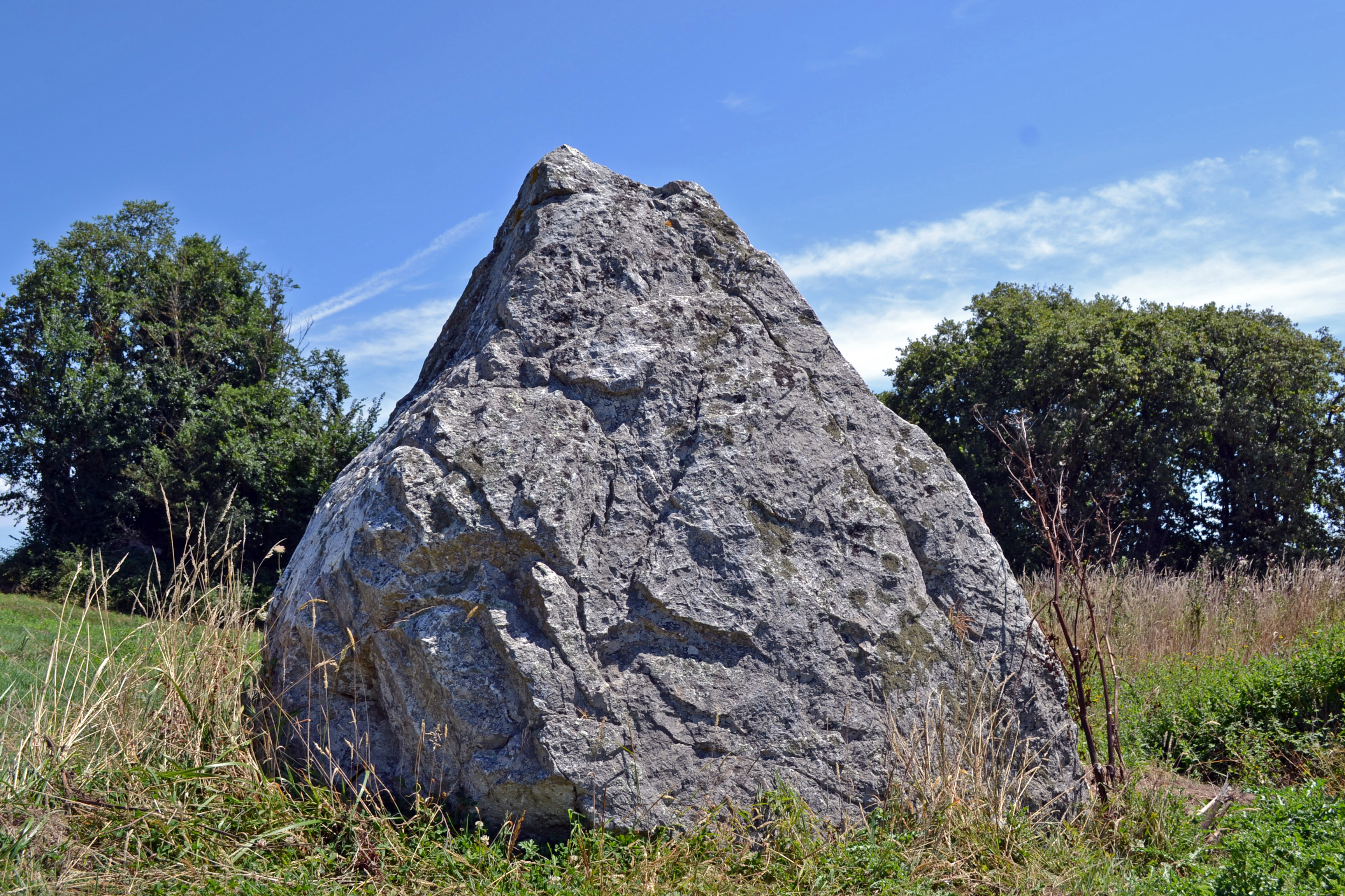 Seul menhir de Brem-sur-Mer : 2,39 m de hauteur, 2 m de largeur et 1,15 m d'épaisseur. D'après la légende, cet énorme bloc de huit tonnes aurait été lancé par Satan pour écraser un garçon de 15 ans et sa vache qui lui avait donné son âme.